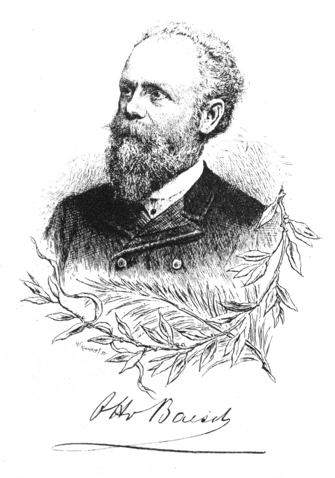 Porträt von Otto Baisch, Stich von Wilhelm Krauskopf nach einer Zeichnung von Hermann Baisch, 1893.